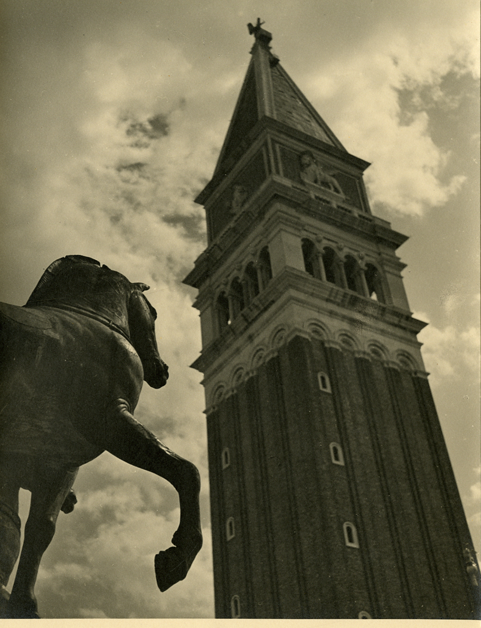 Serie fotografica : Venezia, 1949 / Paolo Monti. - Stampe: 2 : Positivo b/n, gelatina bromuro d'argento/ carta camoscio, 18x24. - ((Al verso delle stampe iscrizione didascalica manoscritta a matita. . - Sul coperchio della scatola iscrizione didascalica manoscritta a pennarello nero: "Ve/ Dono Pambakian".